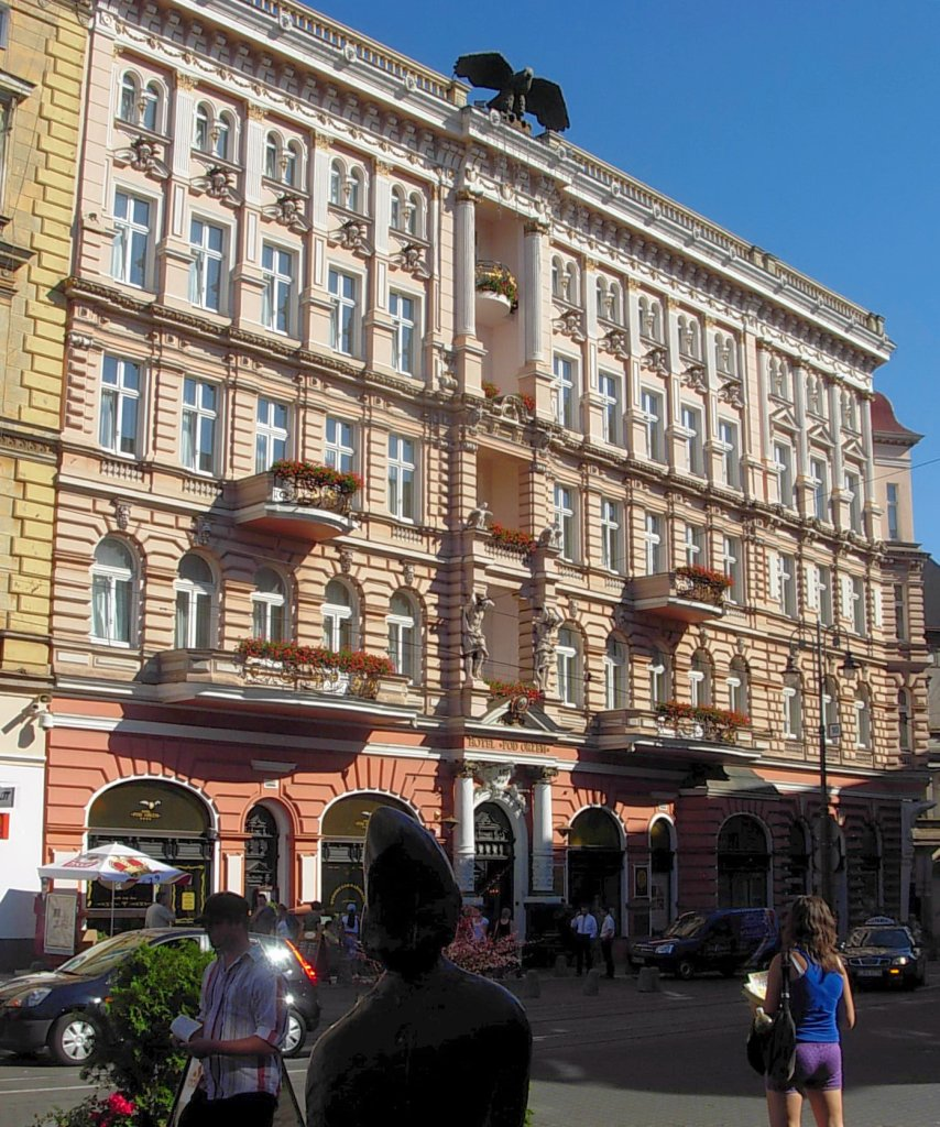 Hotel Pod Orłem w Bydgoszczy